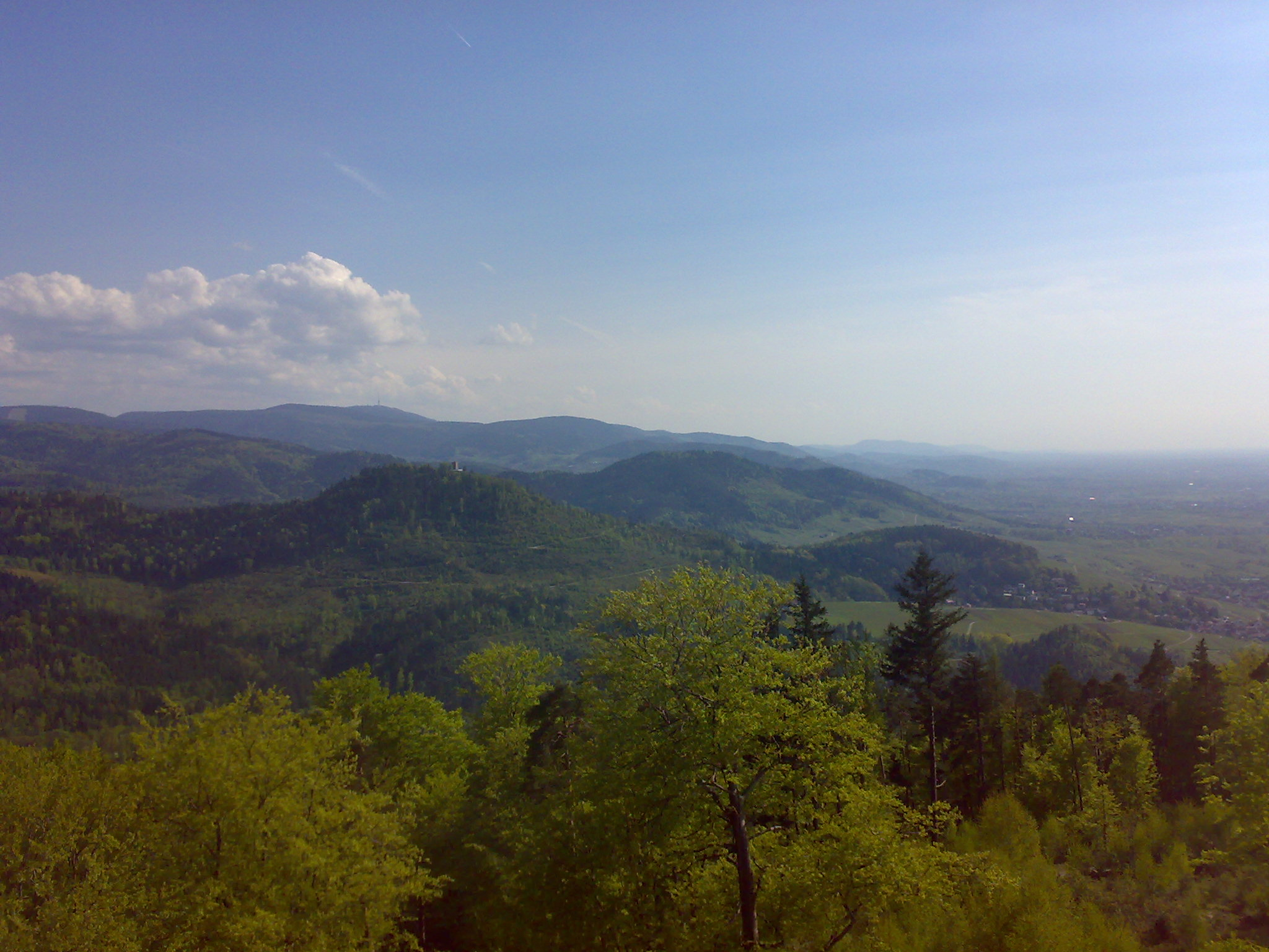 Blick vom Fremersberg auf Yburg und Nordschwarzwald